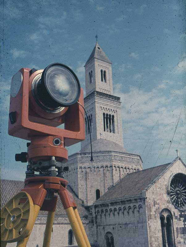 Camera metrica supergrandangolare Wild P31, con focale 45mm su un formato fotogramma 9 x 12 cm.